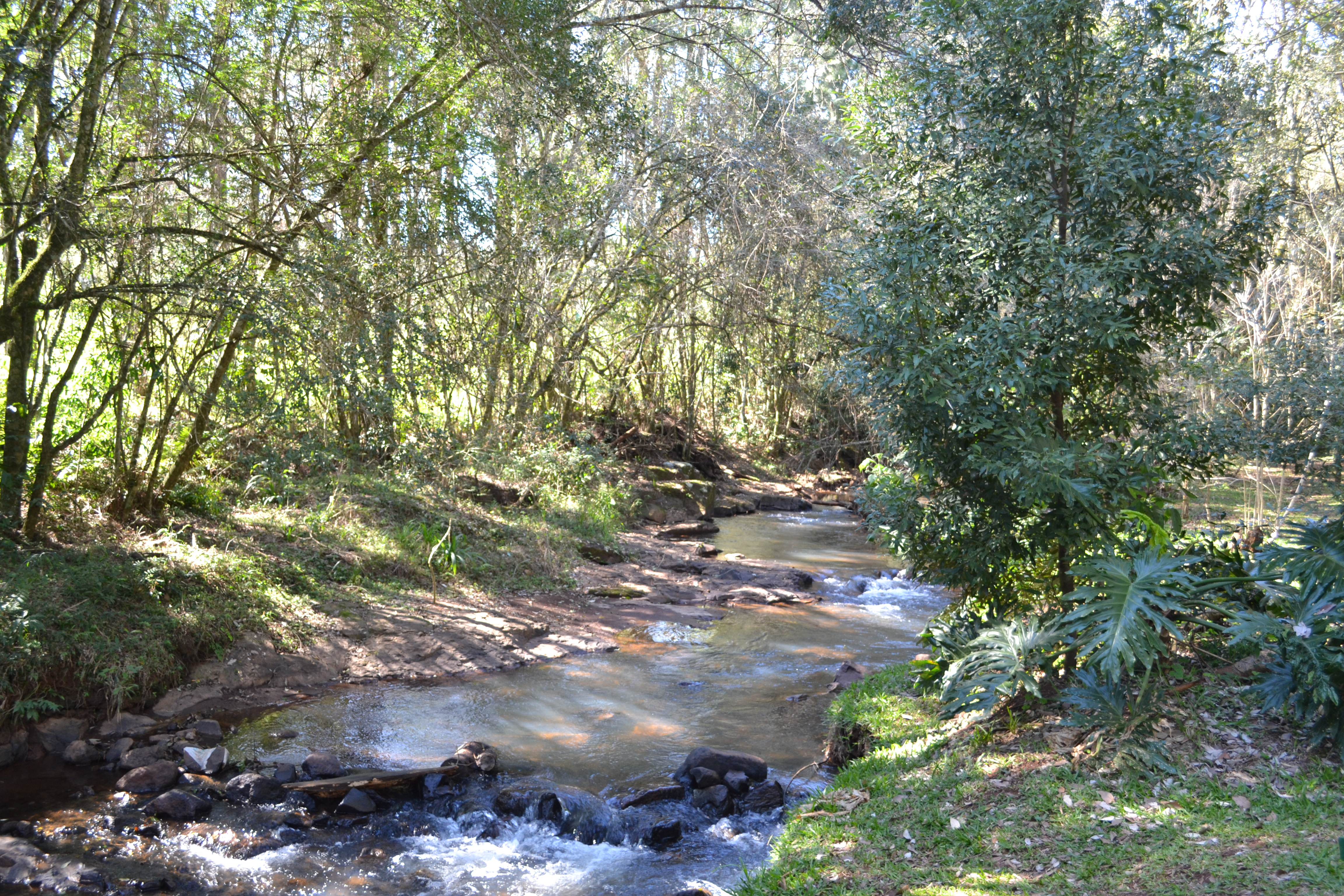 Arroyo Cuñá Pirú en Parque Provincial Salto Encantado